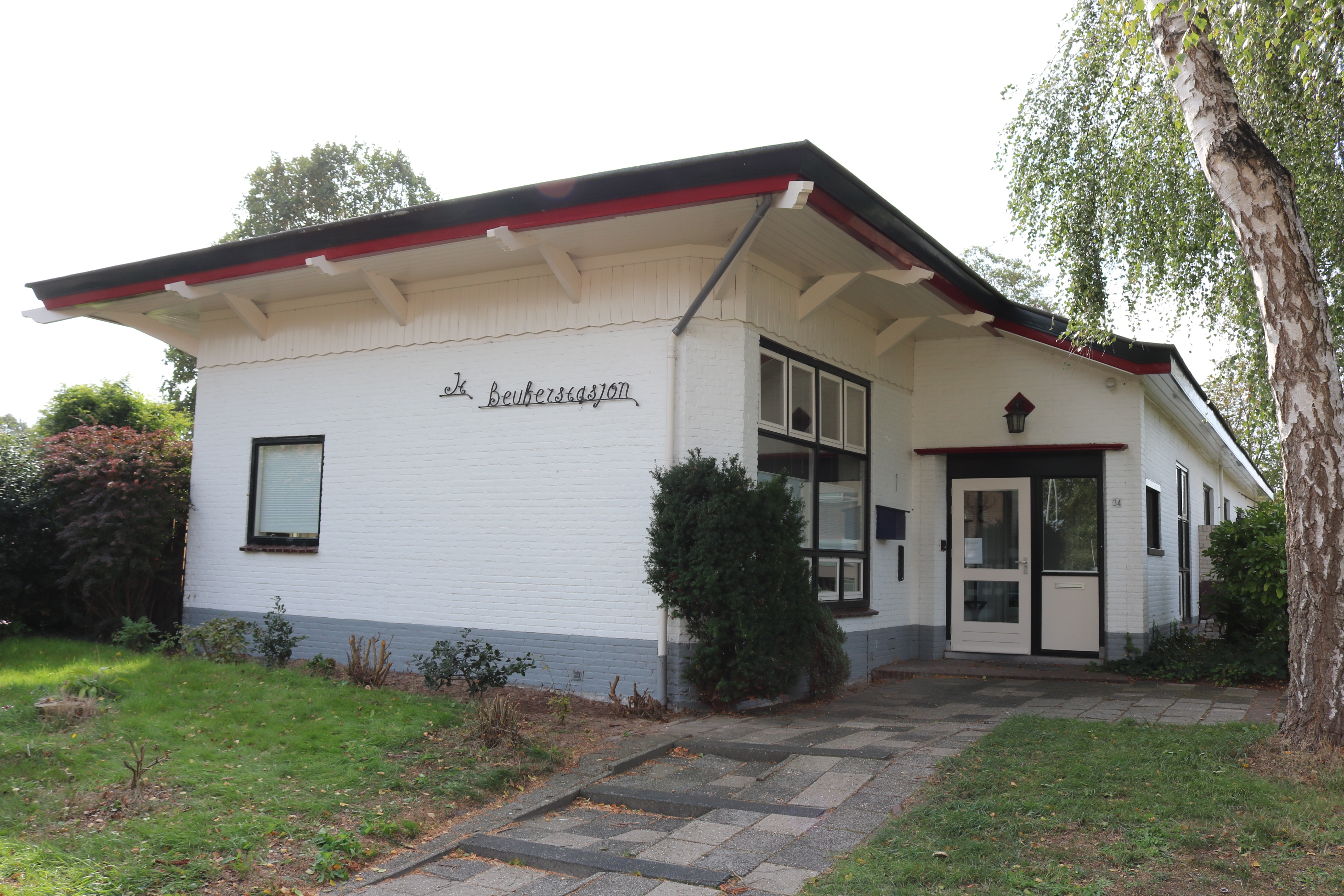 Het voormalige tramstation van Joure (foto: Daniel van der Ree, 20 september 2018)